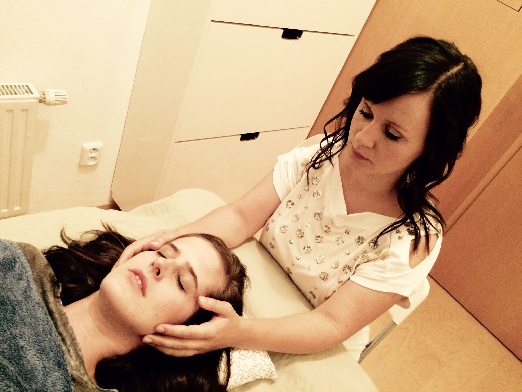 Terapeutka dává kraniosakrální biodynamické ošetření.